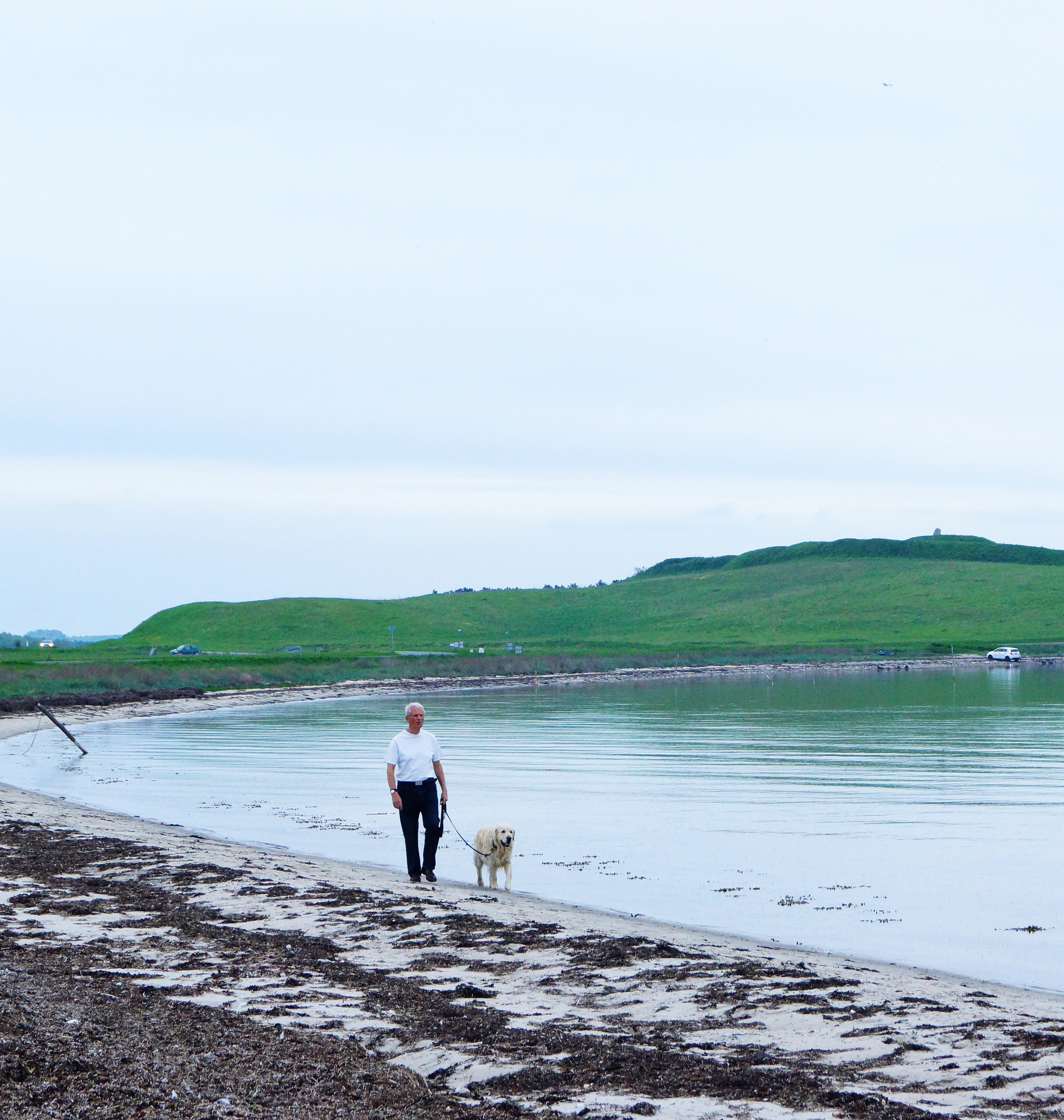 Begtrup Vig gåtur.jpg